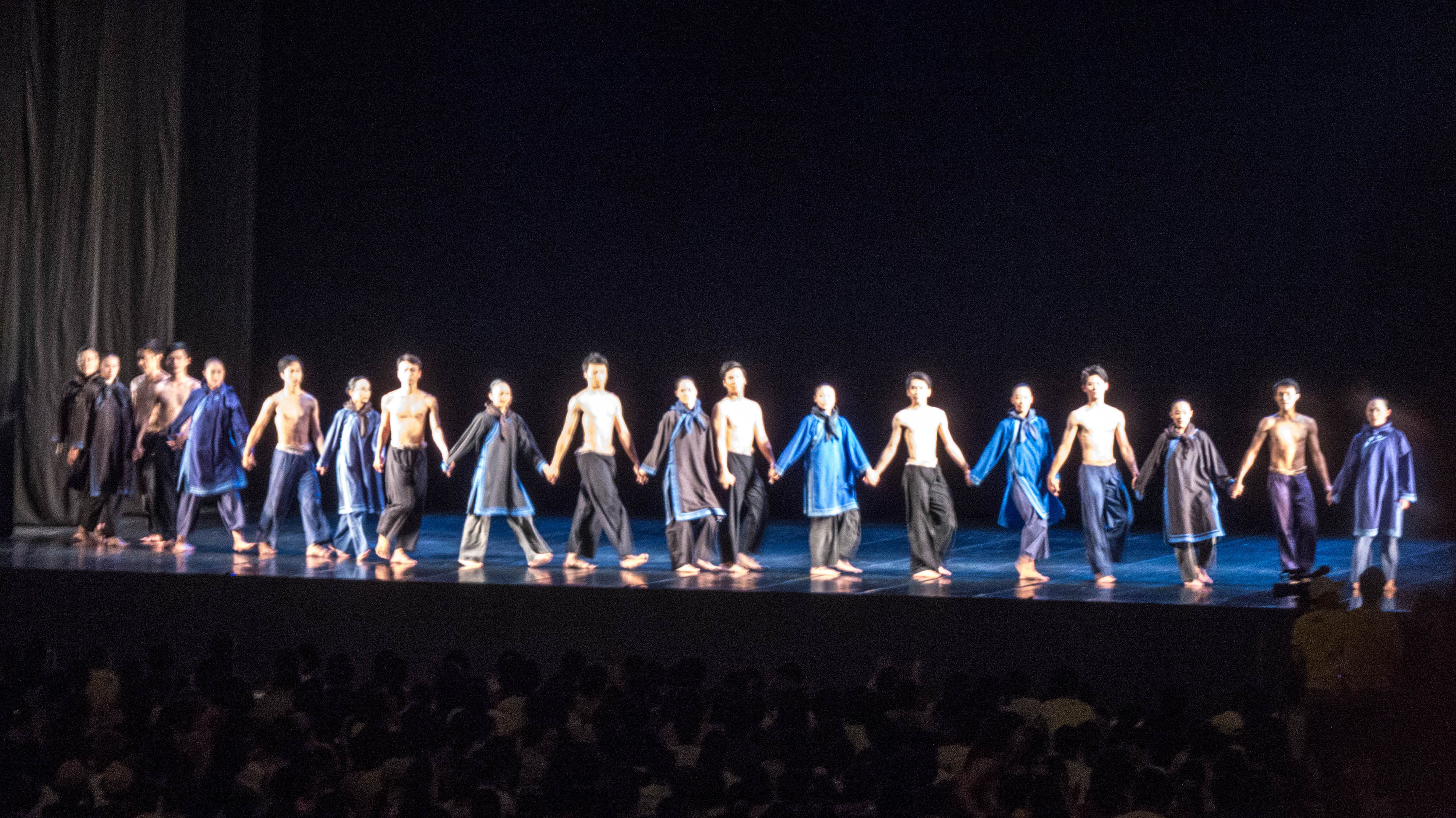 《薪傳》渡海謝幕，攝於國家音樂廳露臺西南角。